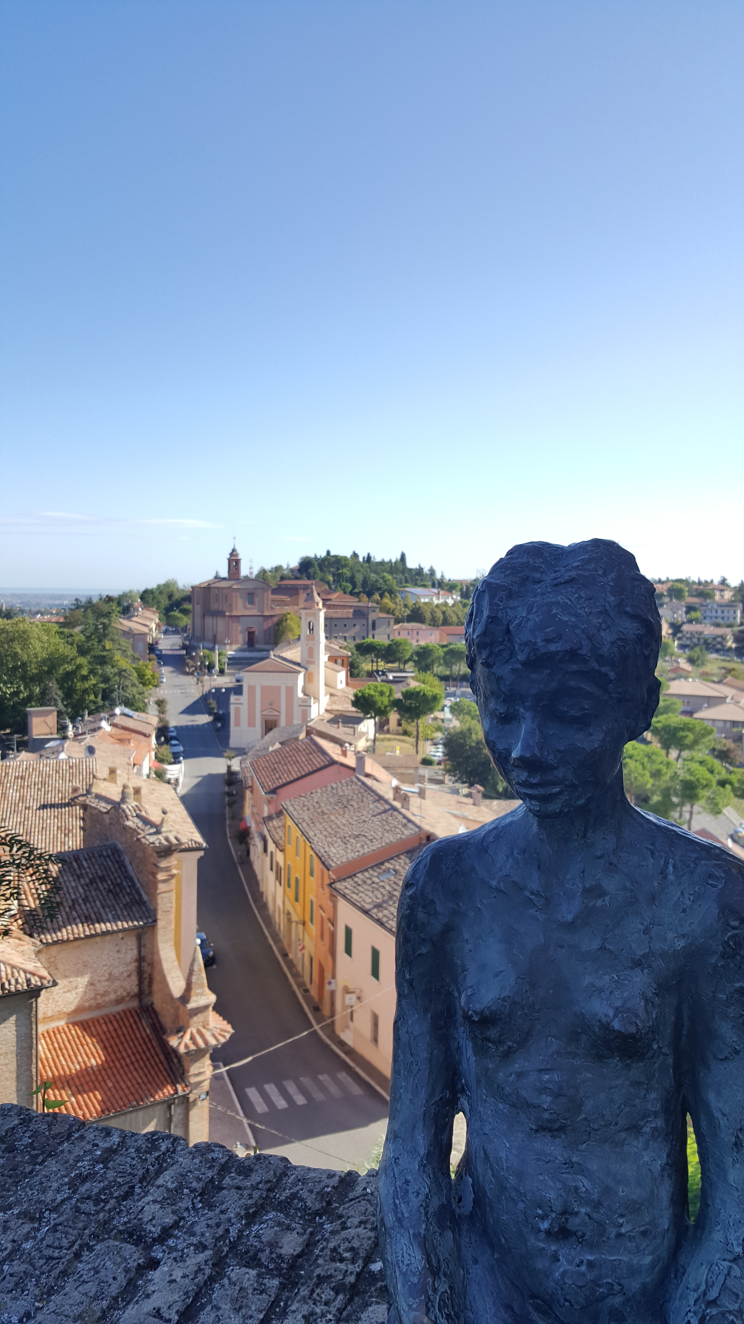 Panorama con "Ragazzina sulle mura" di Ilario Fioravanti This is a photo of a monument which is part of cultural heritage of Italy.